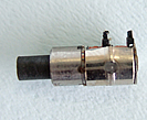 (株)アイカムス・ラボ 製品